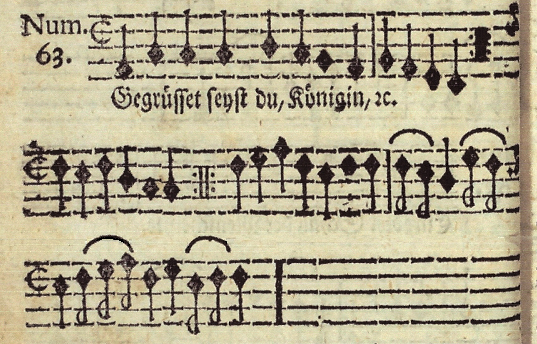 Gegrüßet seist du, Königin, Melodie Hildesheim 1736, Ursprung der Melodie von Hail, Holy Queen enthroned above